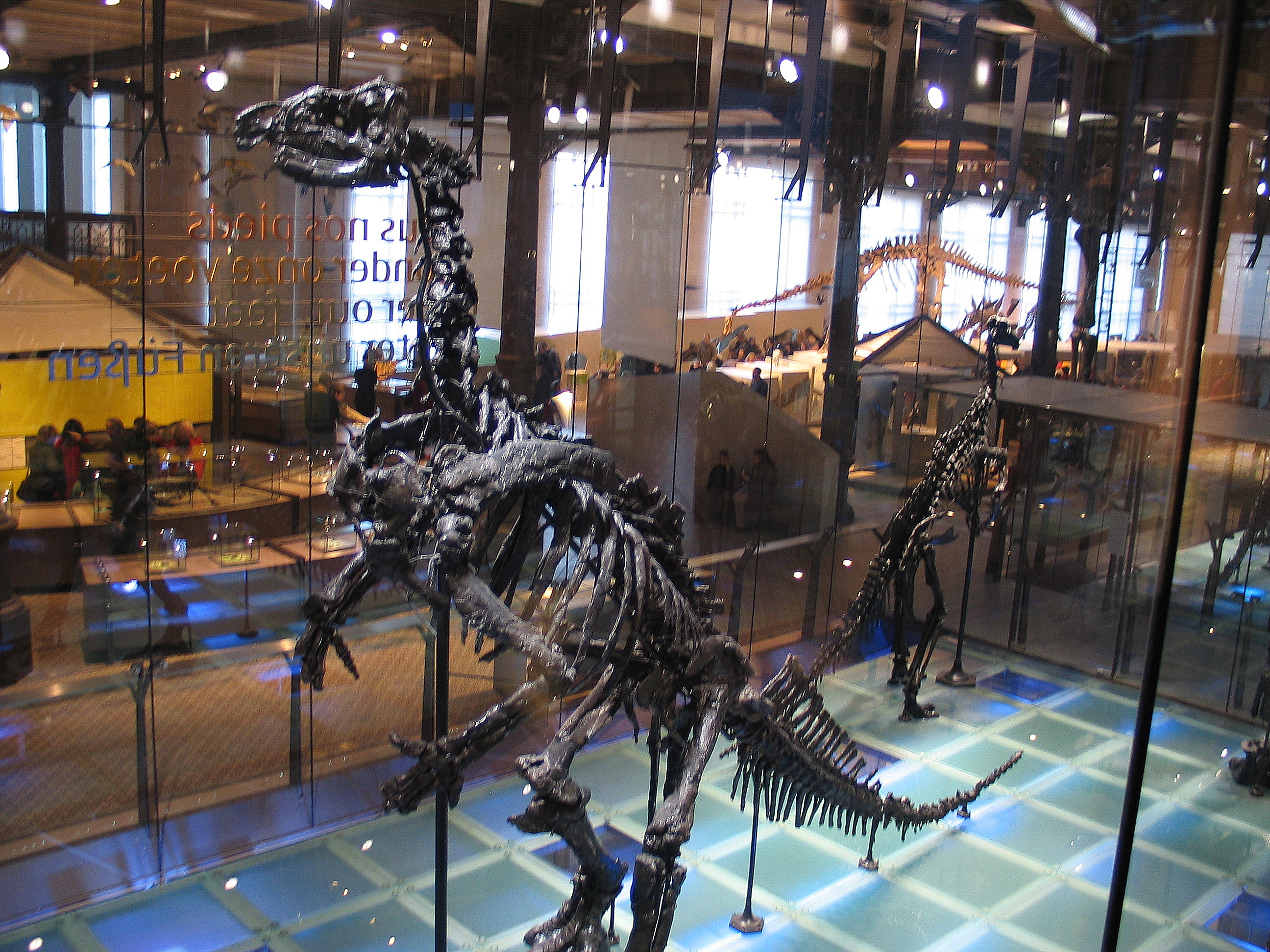 Iguanodon Bernissartensis at the Museum voor Natuurwetenschappen in Brussels, Belgium